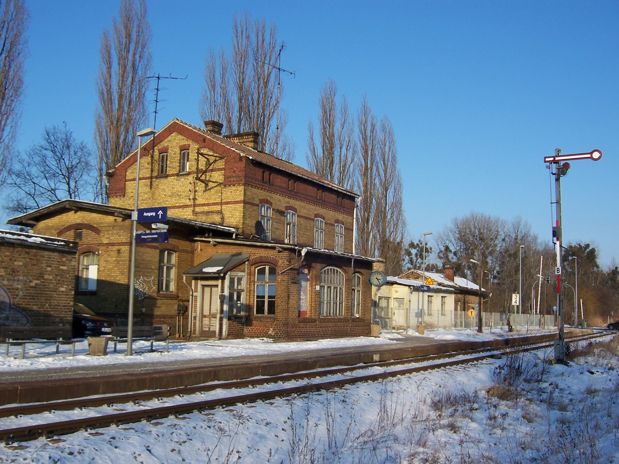 Bahnhofsgebäude Bahnhof Dessau-Alten (Baudenkmal im Denkmalverzeichniss Sachsen-Anhalt, Erfassungsnummer: 094 41137 000 000 000 000 [1])